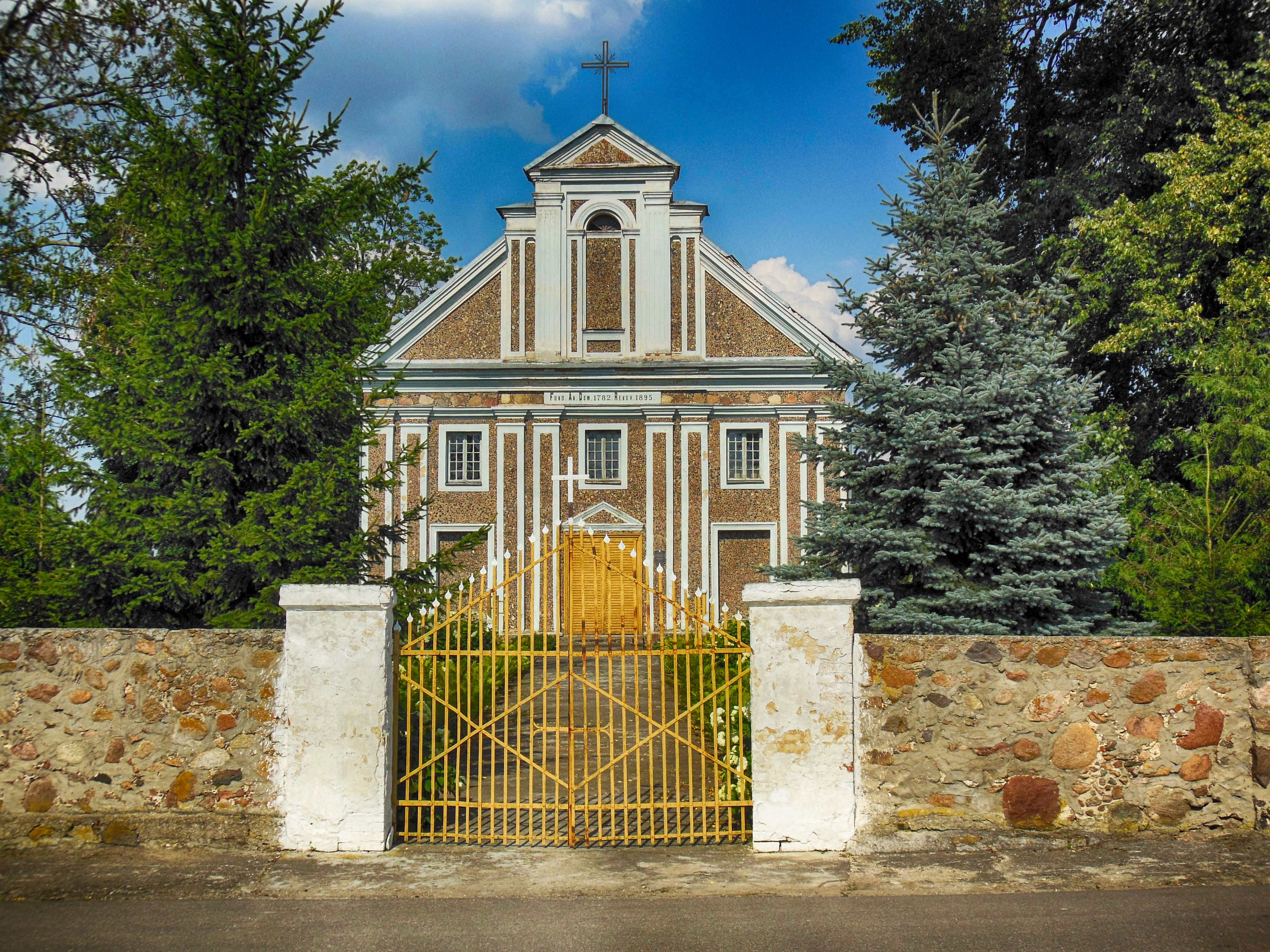 Беларуская (тарашкевіца): Комплекс касьцёла Сьв. Ганны. в. Лунна This is a photo of Belarusian heritage monument. Reference number: 413Г000376 ( WLM)